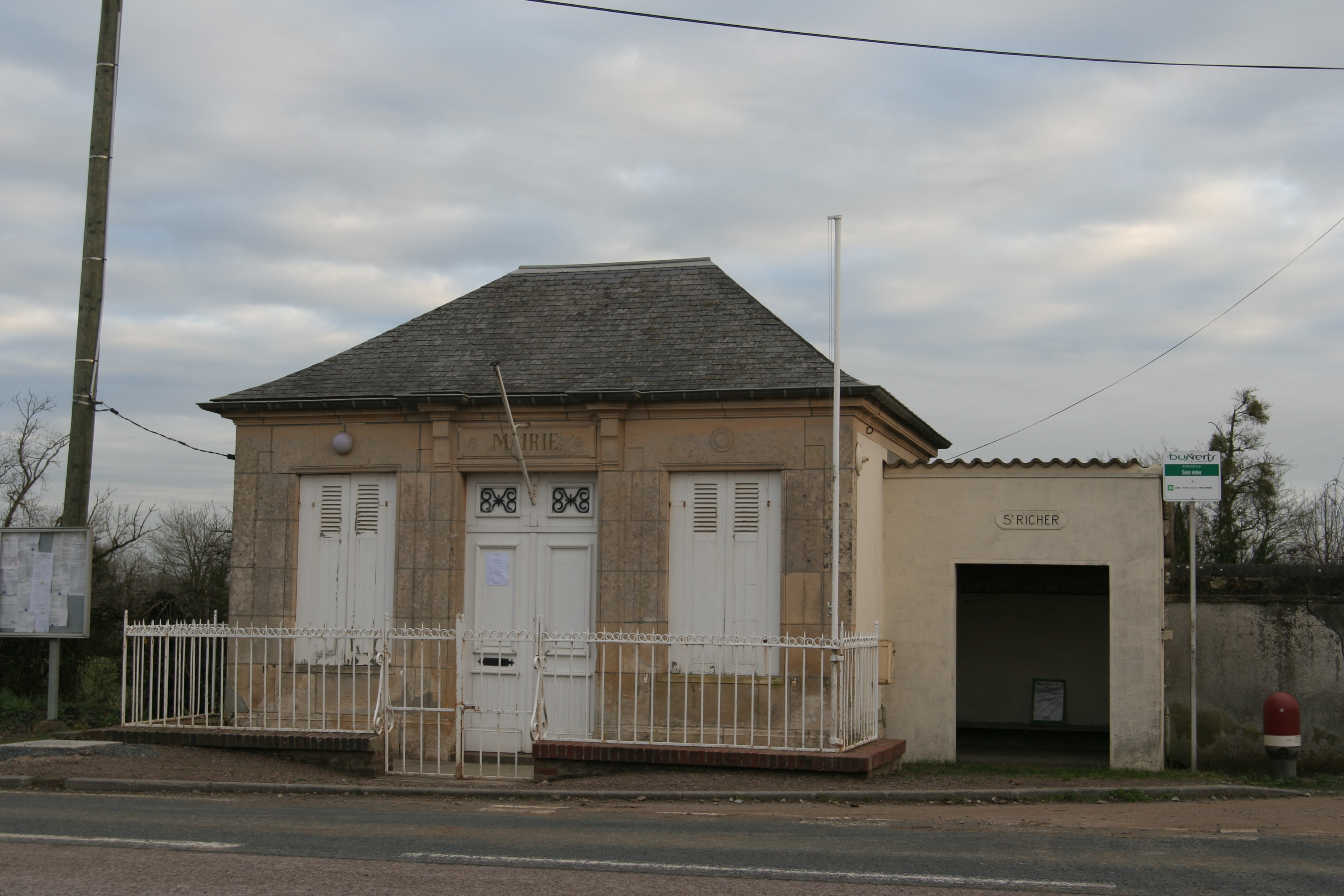 Mairie de Basseneville.